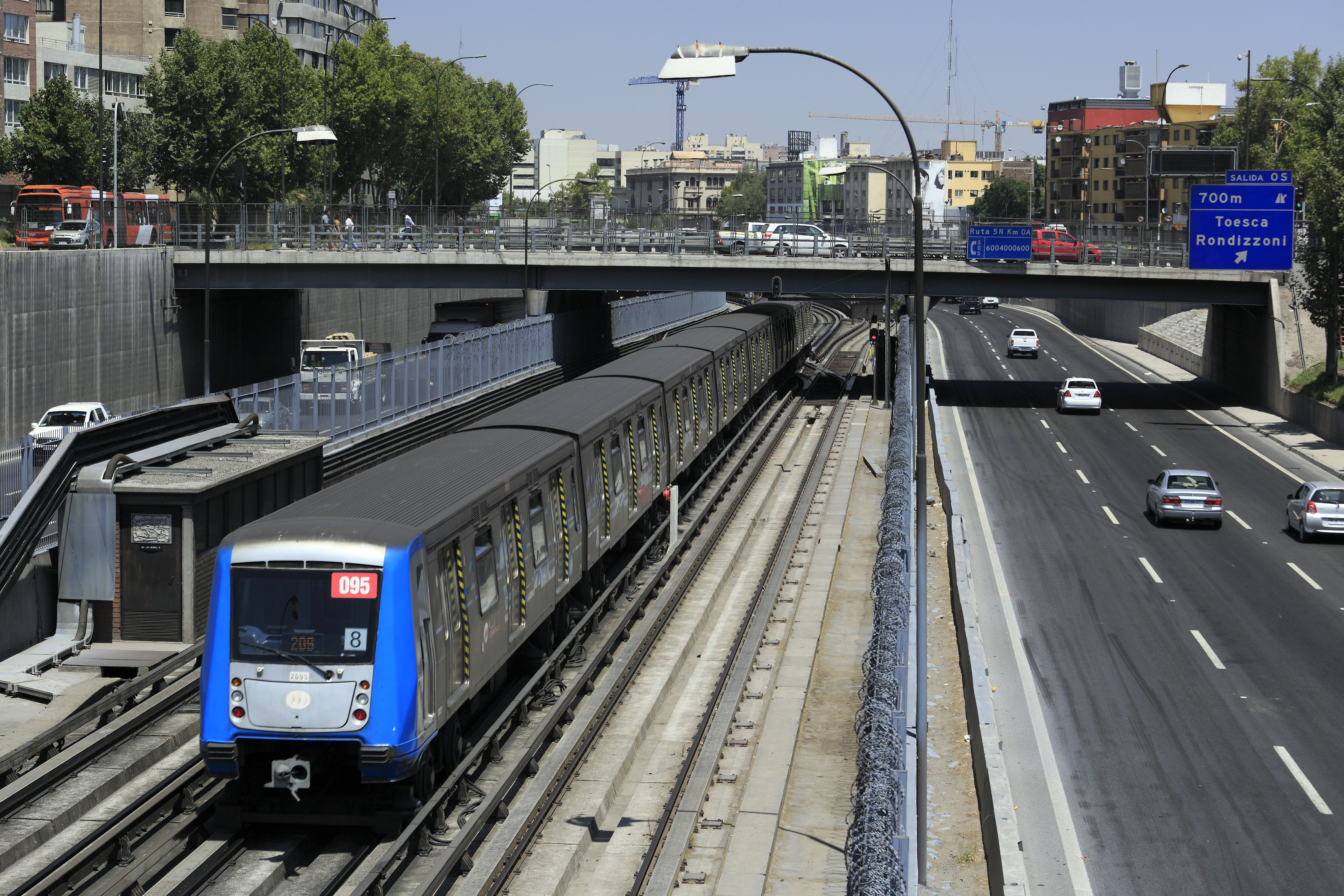 Von der Brücke der Calle Agustinas Richtung Süden, die Brücke im Bild ist die der Calle Moneda. Die nach Pariser Vorbild mit zusätzlichen Laufbahnen für Gummireifen ausgerüstete Strecke verläuft hier auf dem Mittelstreifen der »Autopista central«. Der Zug fährt südwärts nach La Cisterna. Nachschuss. Das zusätzliche Gleis rechts ist eine Verbindung zwischen den Linien 1 unter der Avenida Alameda und der Linie 5 unter der Calle Catedral.